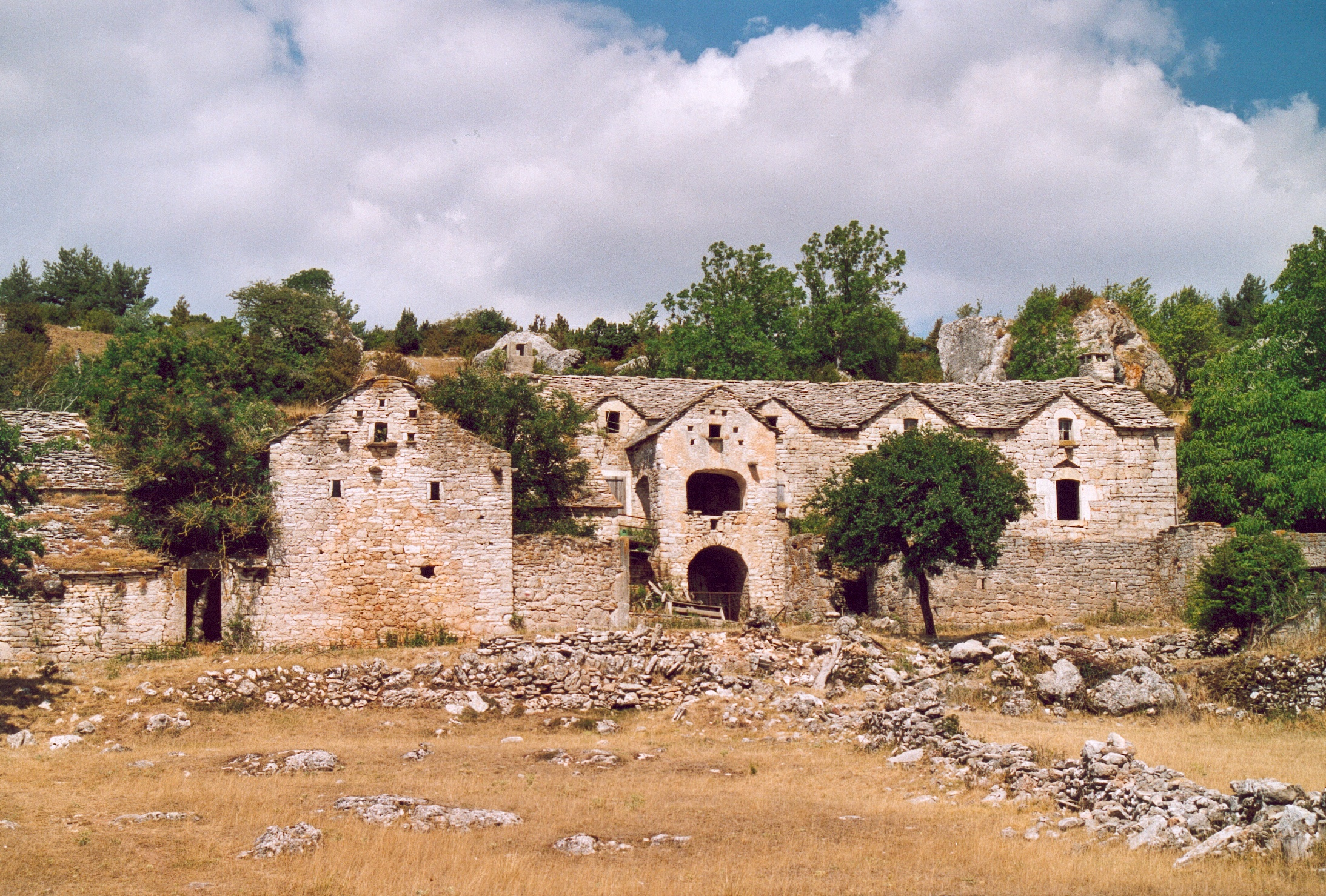 France Lozère Saint-Georges-de-Lévéjac Photographie prise par GIRAUD Patrick Août 2005